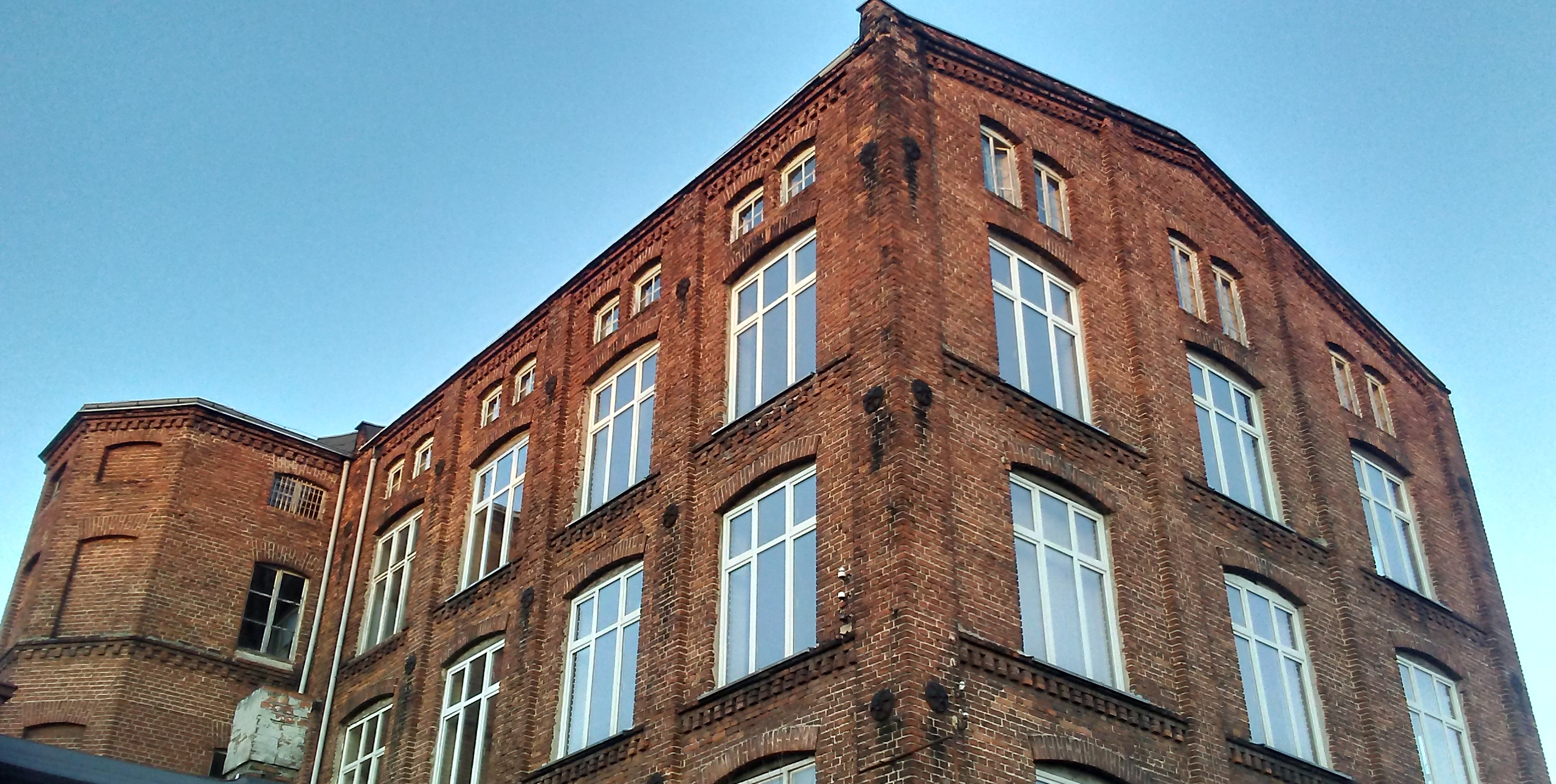 Tomaszów Mazowiecki w województwie łodzkim, PL, EU. Budynek dawnej szkoły budowlanej w przyszłości Centrum Aninacji Społecznej. CC0